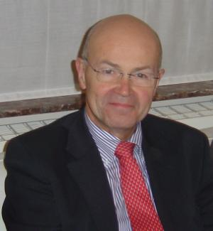 Photo de Jean Claude Lahaut, jusqu'à mi 2013 le Secrétaire Général du CEFIC